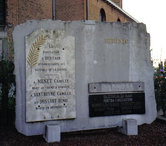 Sur la place d'Hertain, le village met à l'honneur ses combattants morts durant la deuxième guerre mondiale